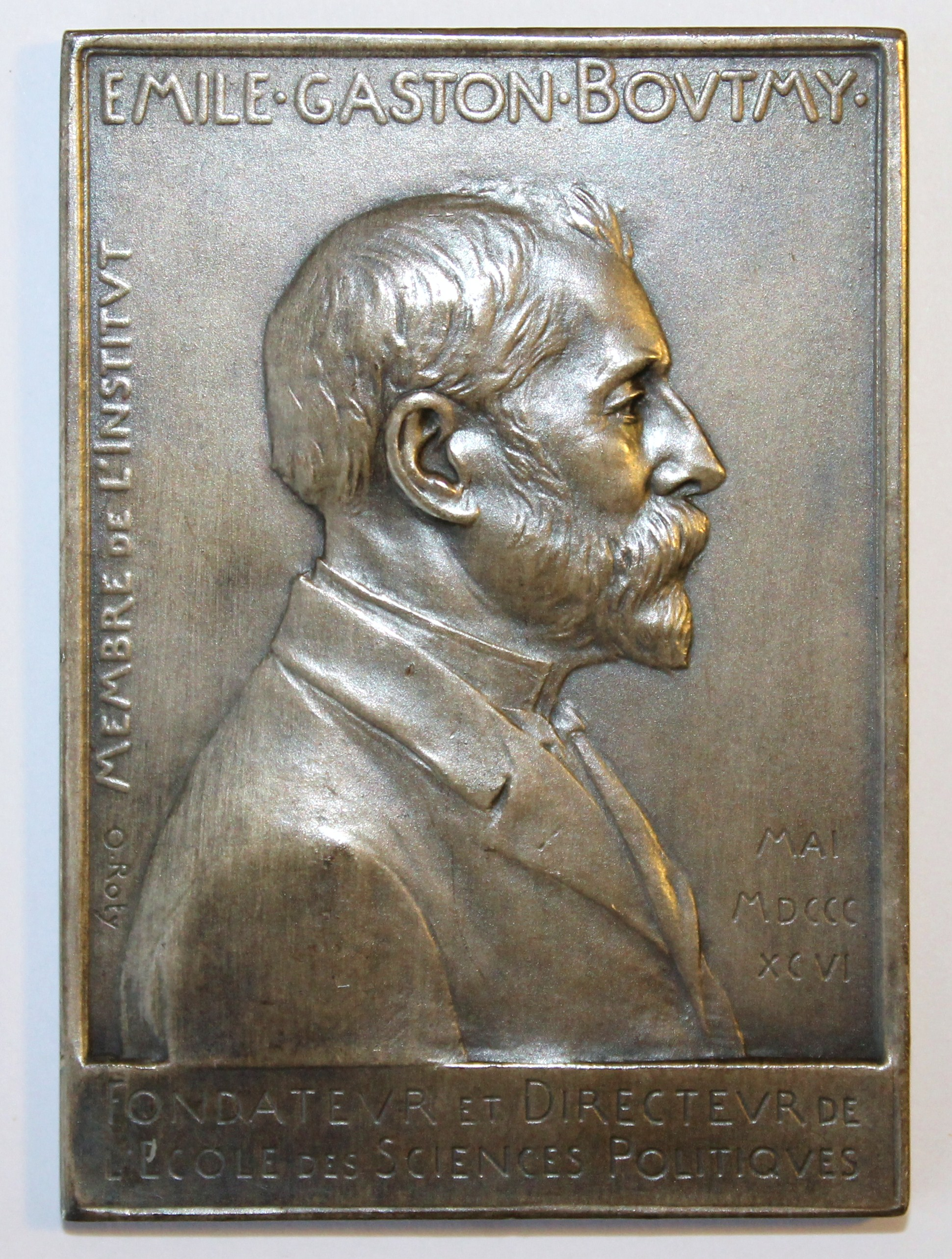 Émile Boutmy fondateur de l’École des Sciences Politiques. La médaille a été réalisée à l'occasion du 25ème anniversaire de l'école